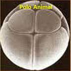 Identificação do polo animal na 3ª clivagem de um óvulo holoblático